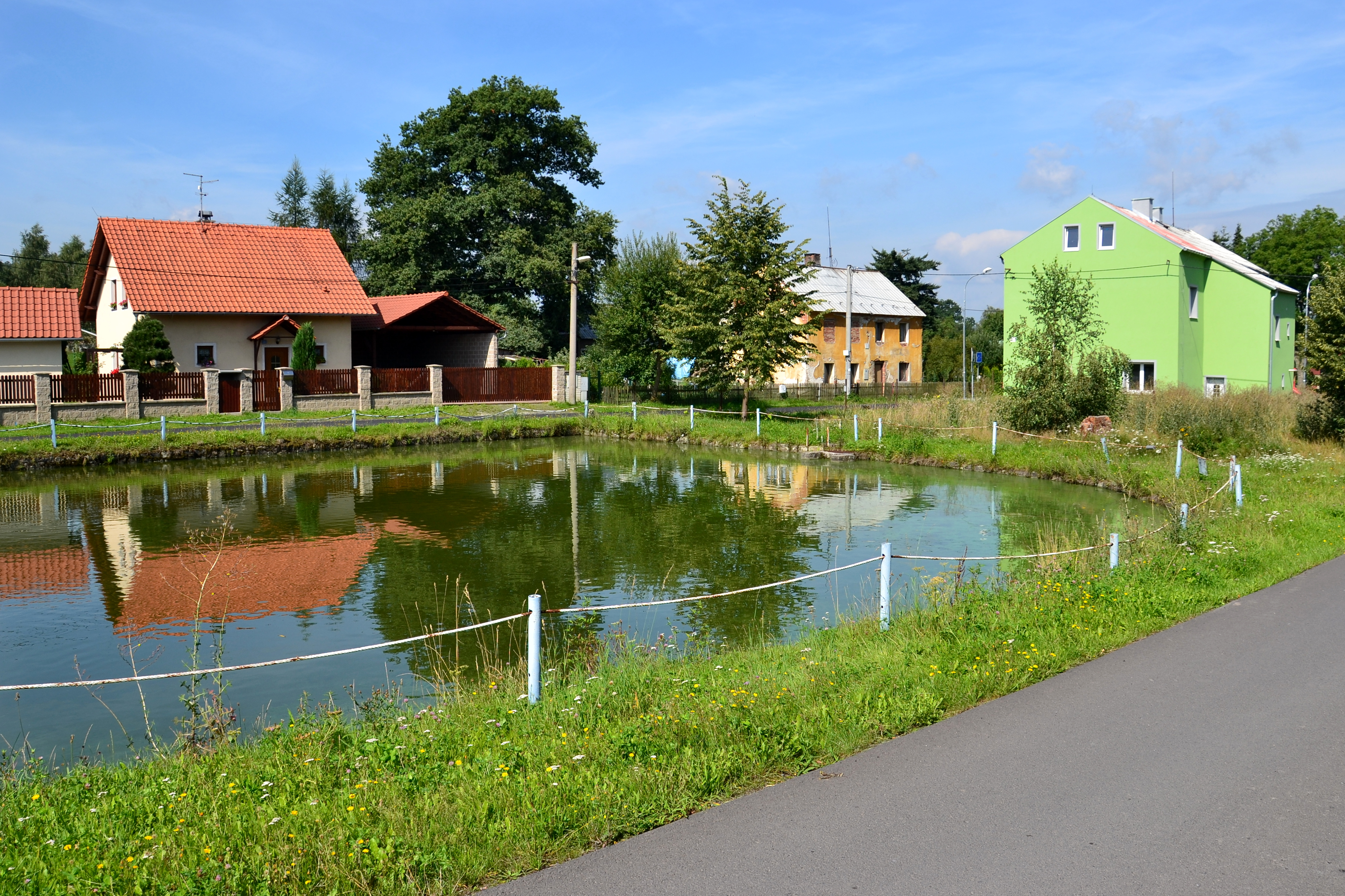 Návesní rybník